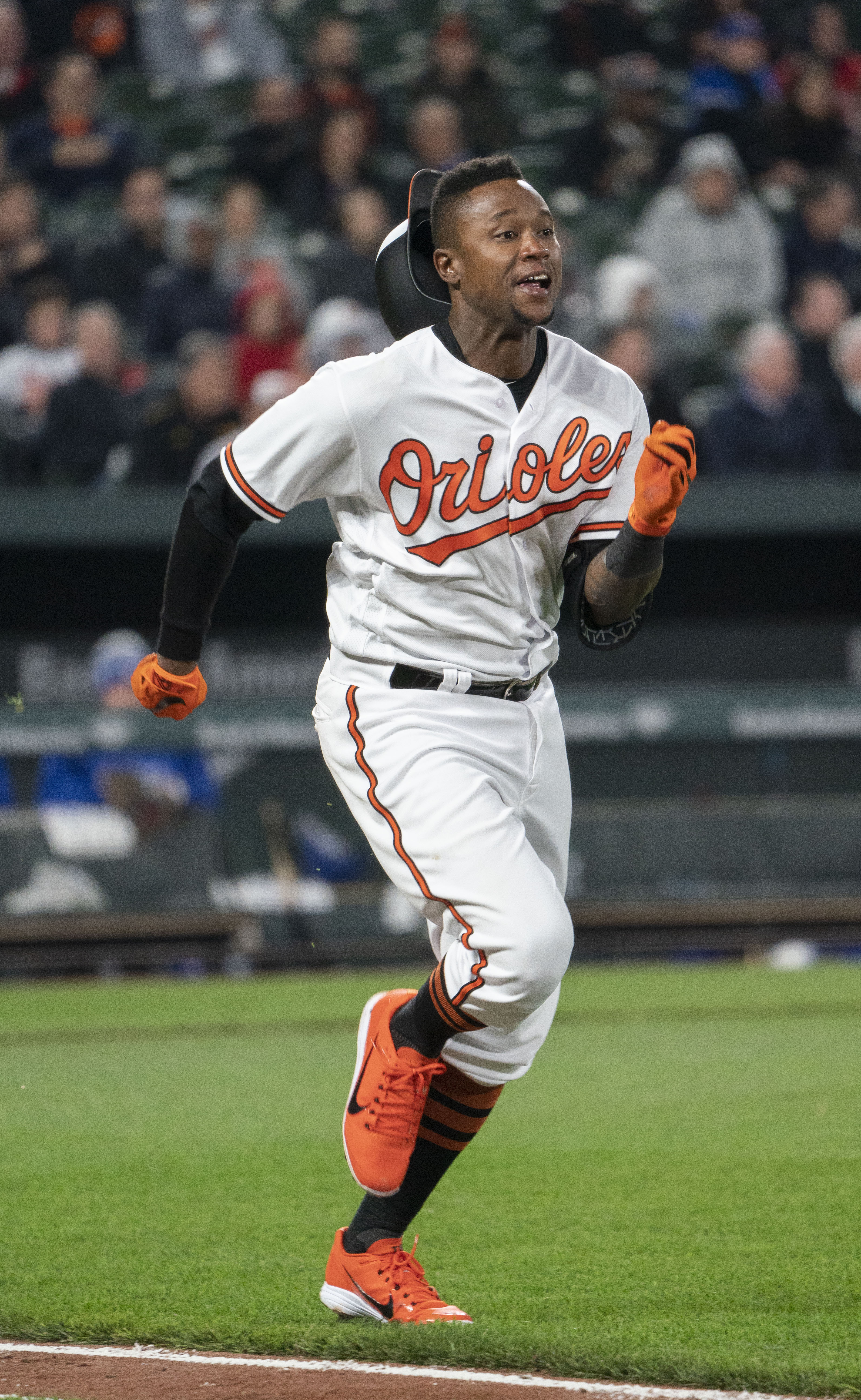 Blue Jays at Orioles 4/11/18